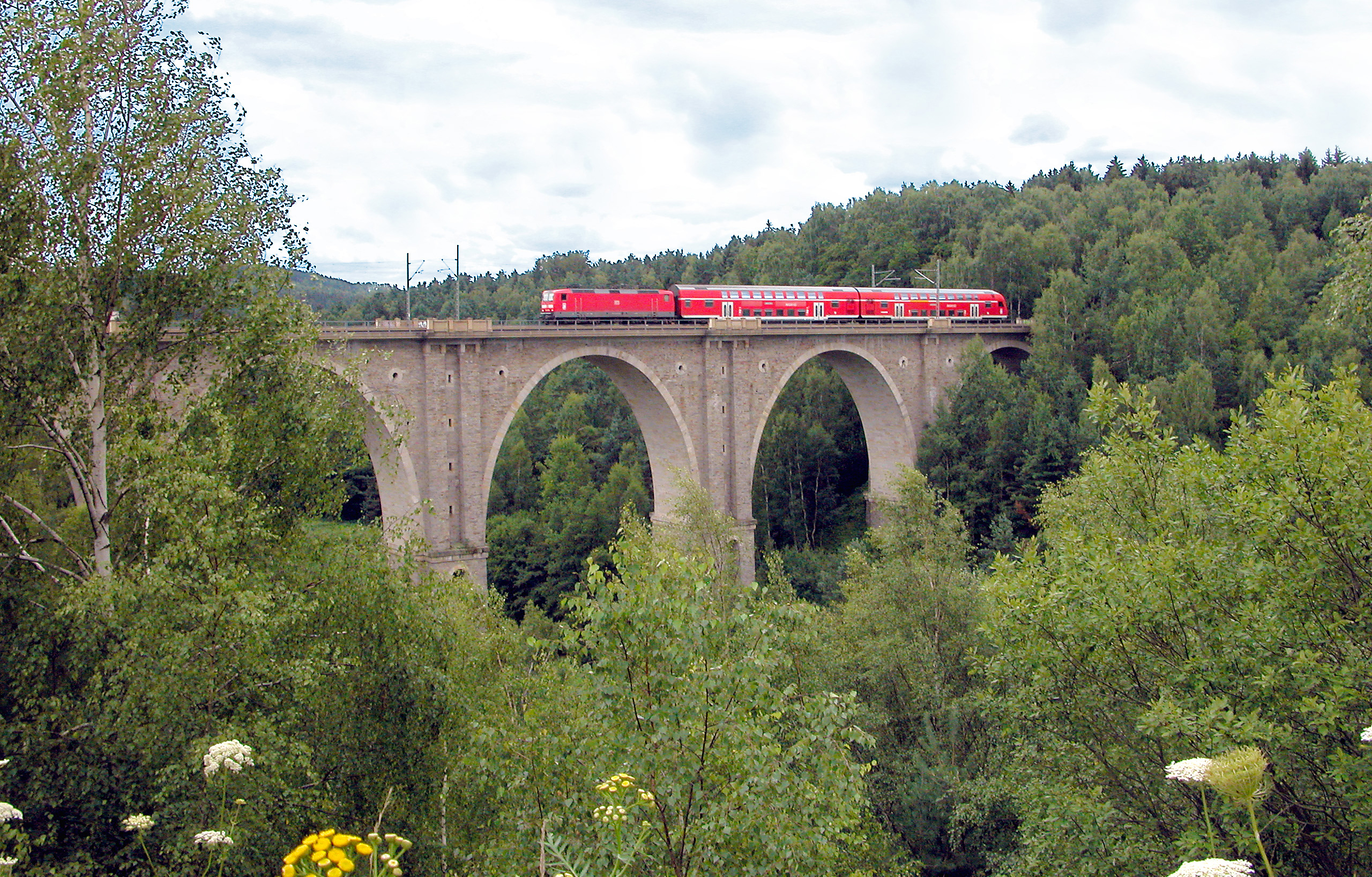 23.07.2011 09627 Hilbersdorf-Muldenhütten (bei Freiberg Sa.): Muldeviadukt (GMP: 50.899941,13.387172). [DSCNn2613.TIF]20110723400DR.JPG(c)Blobelt